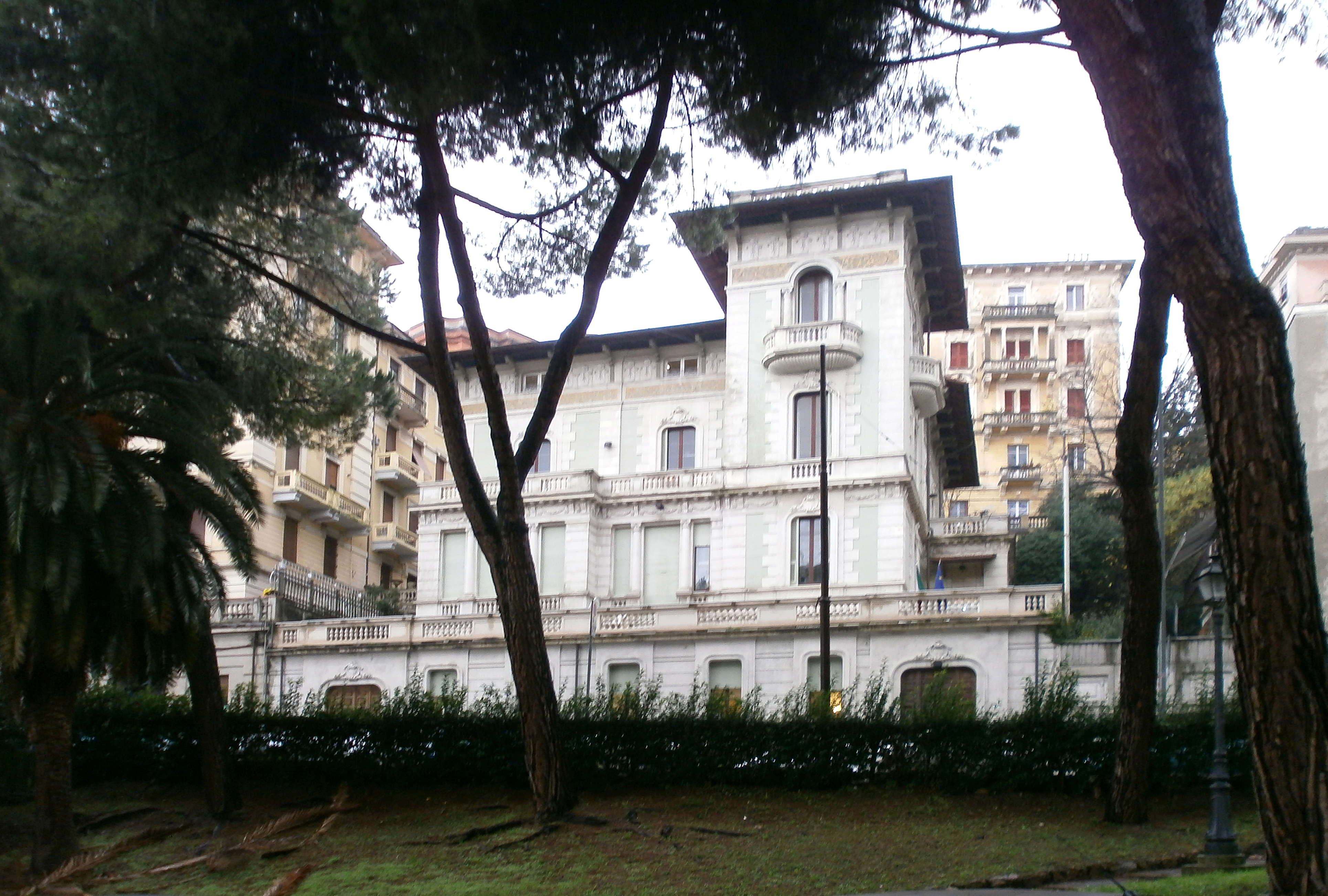 Villa Marmori en La Spezia, sede actual del Conservatorio Estatal de Música "Giacomo Puccini"